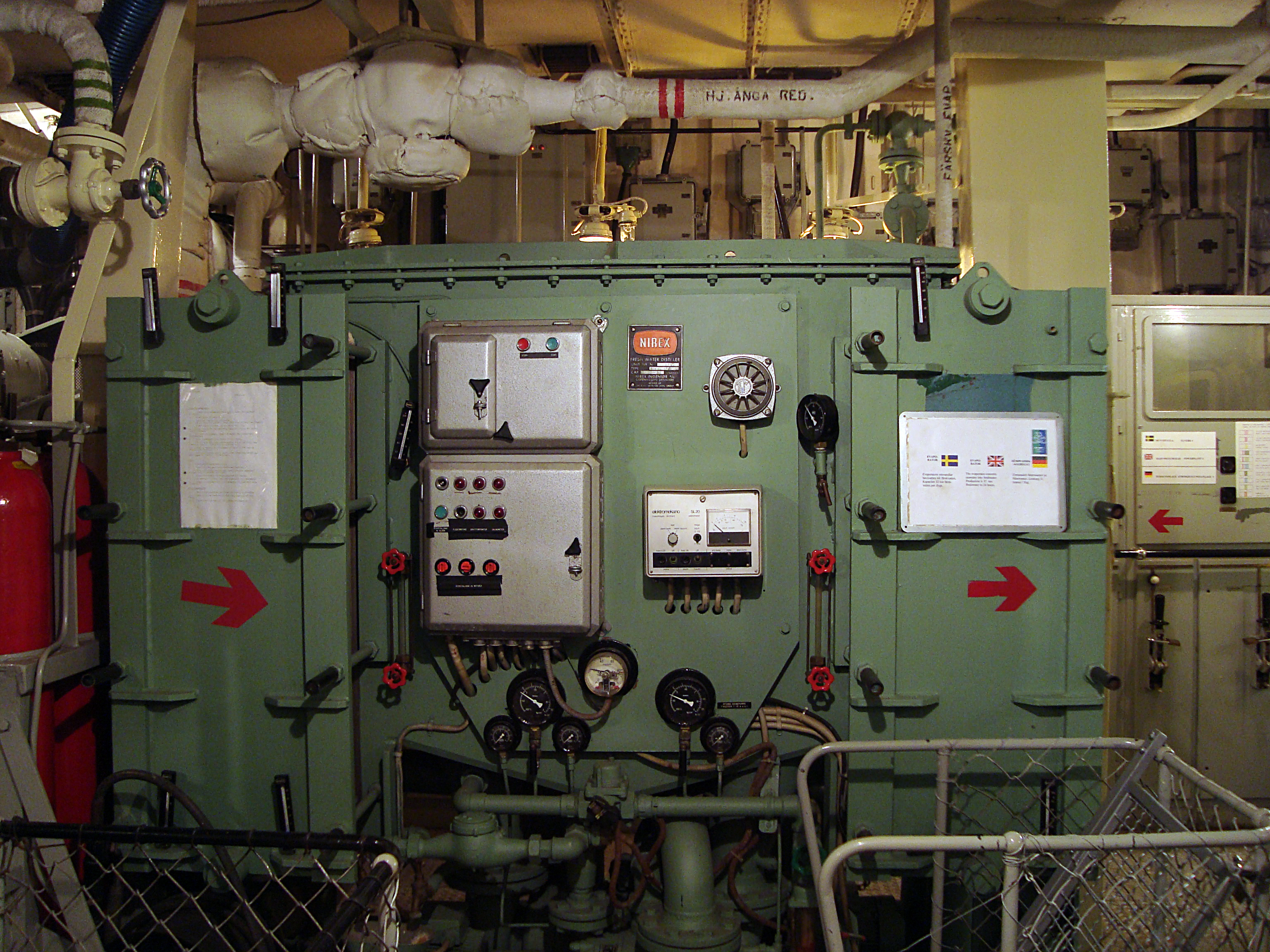 Evaporator, gör havsvatten till färskvatten. Kapacitet 32 ton per dygn. HMS Småland, Maritiman, Göteborg.